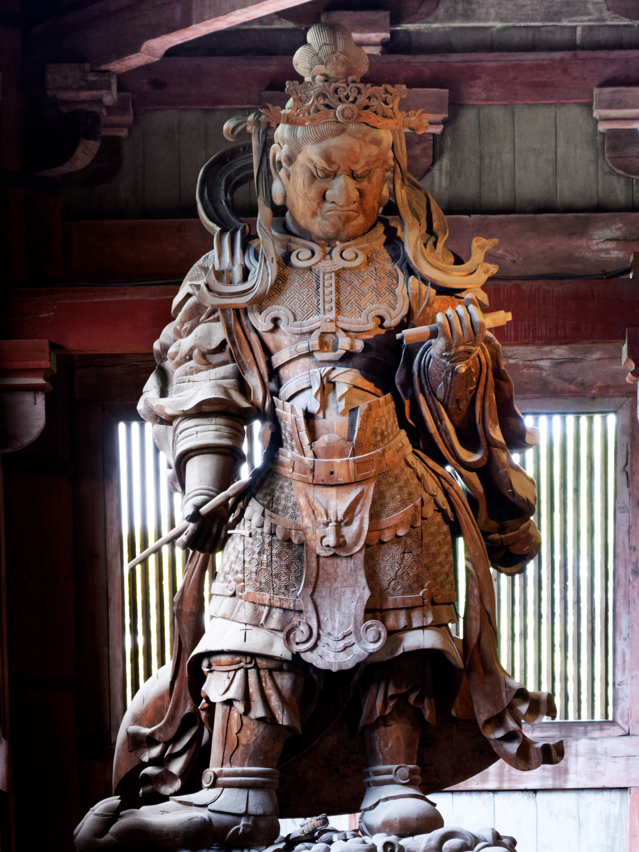 Statue de Kōmokuten, (également appelé Komokuten ou Koumokuten). Il est l'un des quatre rois célestes du bouddhisme. Celui qui représenté ici est le gardien à la gauche du bouddha au temple Todai-ji à Nara